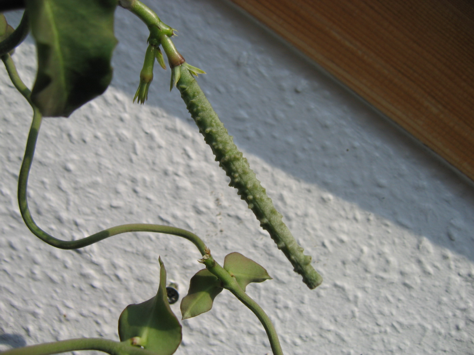 Ceropegia sandersonii, fruit